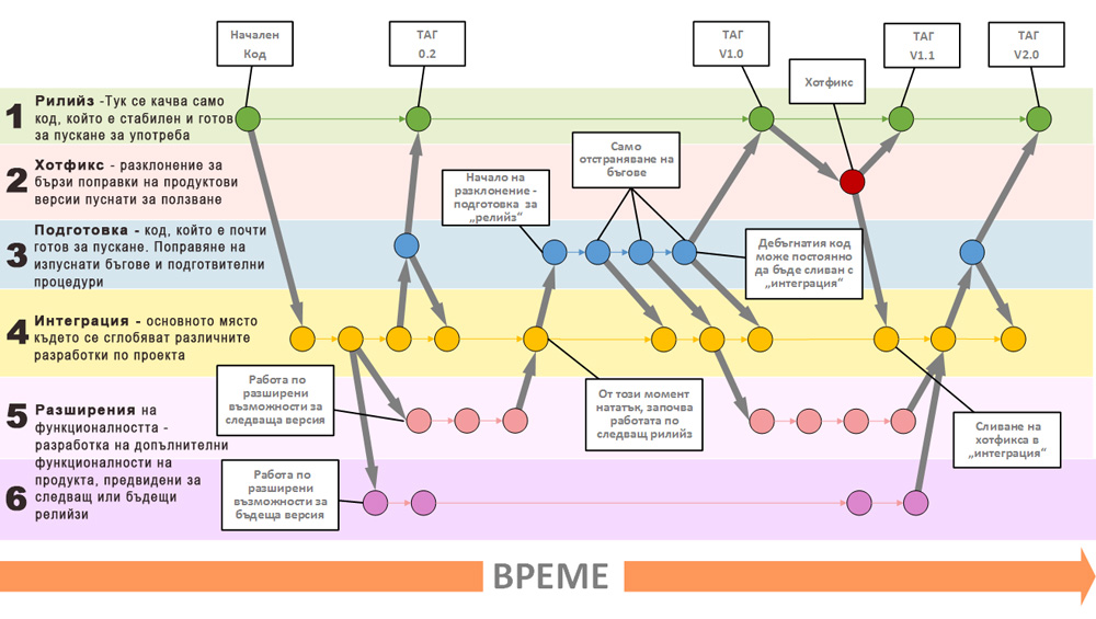 Примерен модел за използване на система за контрол на версиите при софтуерна разработка.